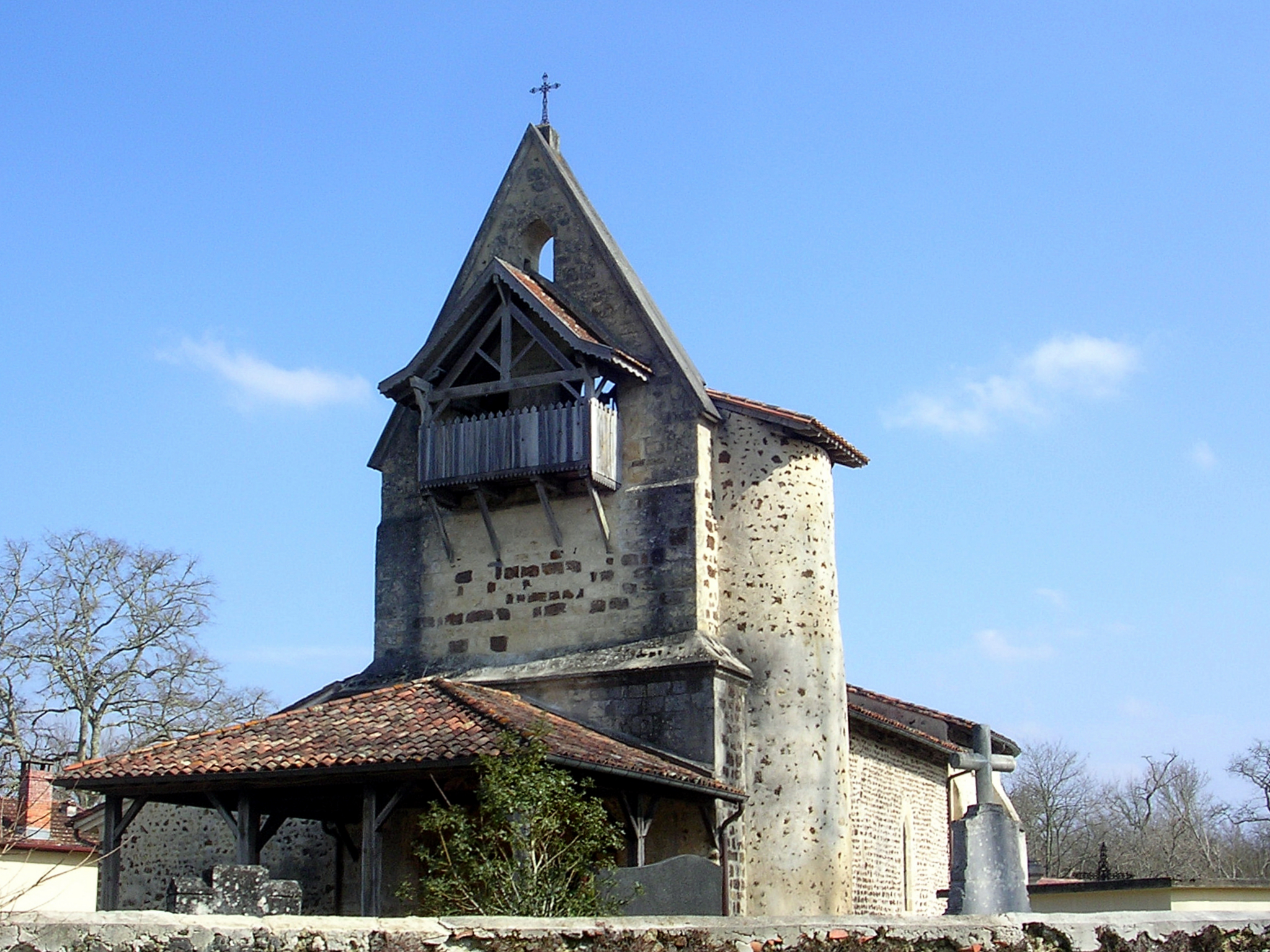 Eglise de Belhade, dans le département français des Landes